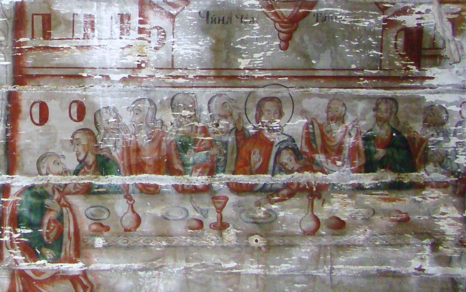 Biserica de lemn din Sălișca Deal